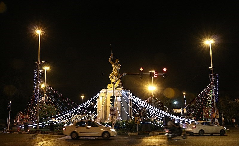 میدان حر